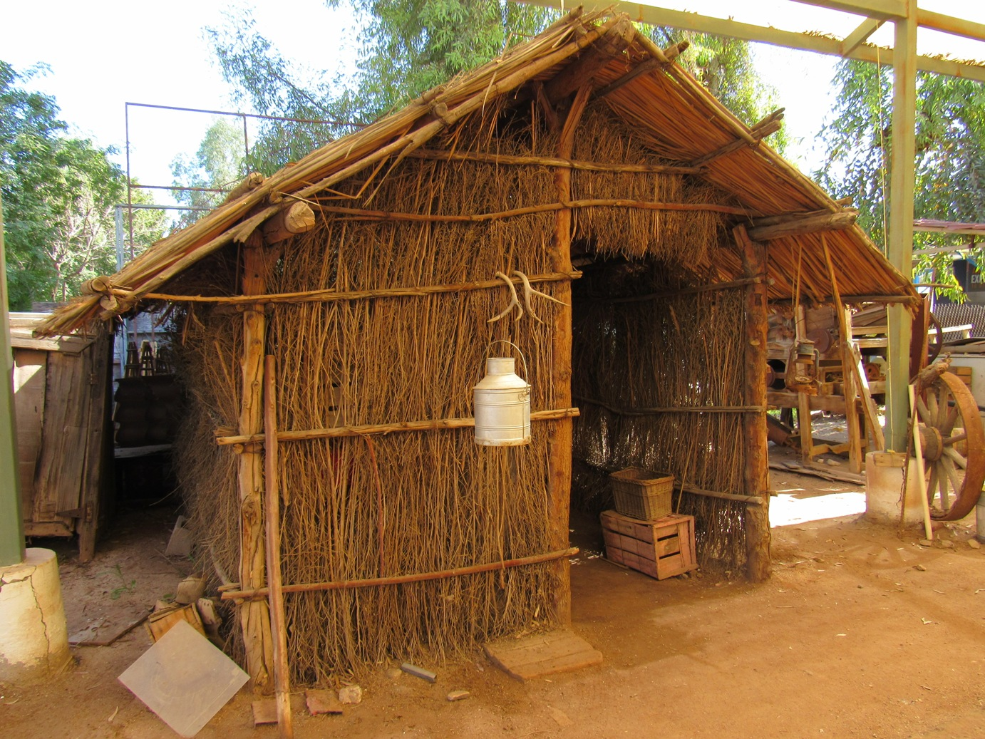 En el museo comunitario el asalto a las tierras 1937, se encuentra esta réplica de una choza de hecha de cachanilla, como aquellas en las que habitaron los primeros pobladores de la ciudad y valle de Mexicali, es debido a esto que se utiliza el gentilicio informal: "cachanilla" para referirse a los mexicalenses.